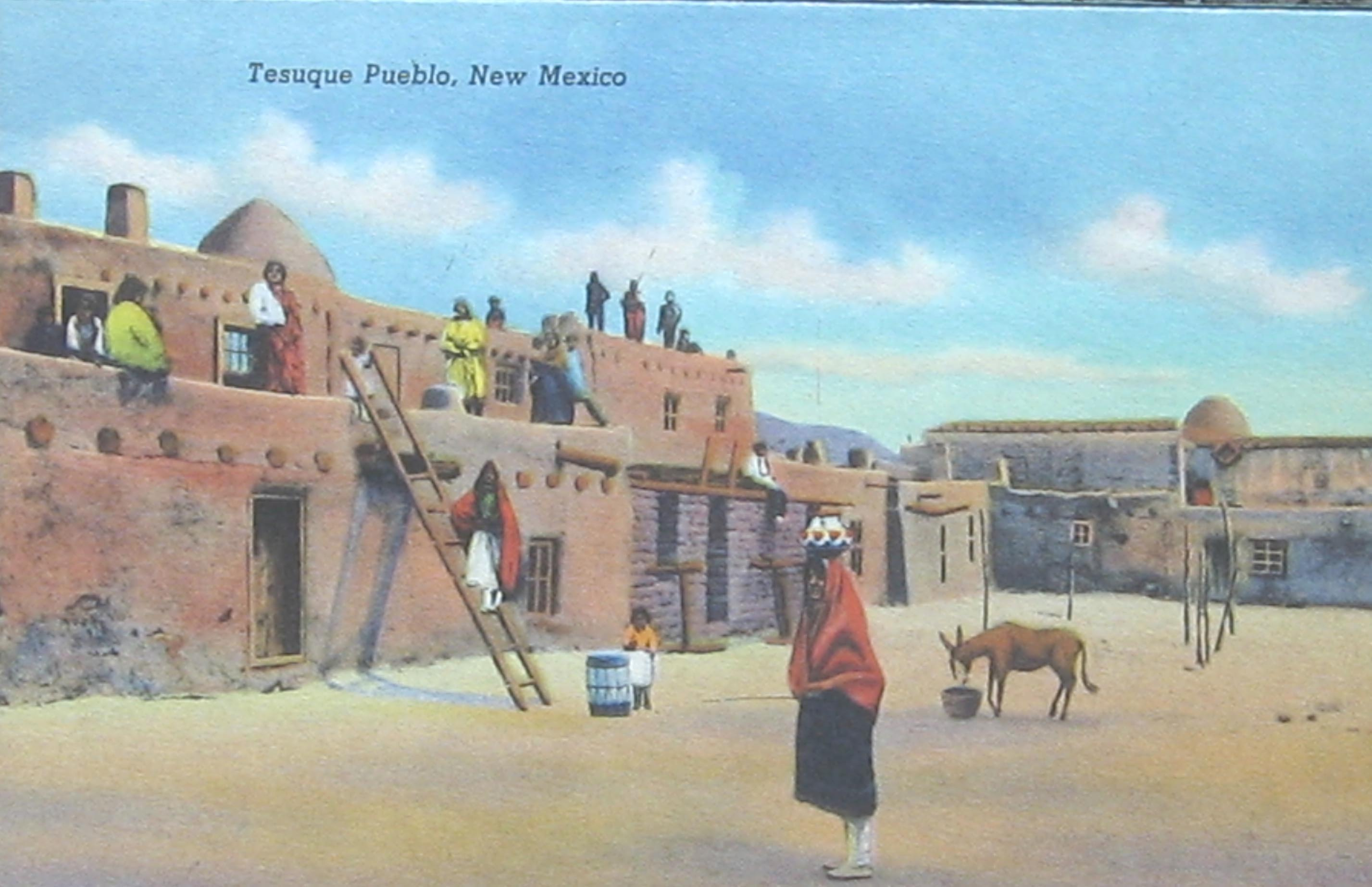 Vintage postcard at Tesuque Pueblo, NM